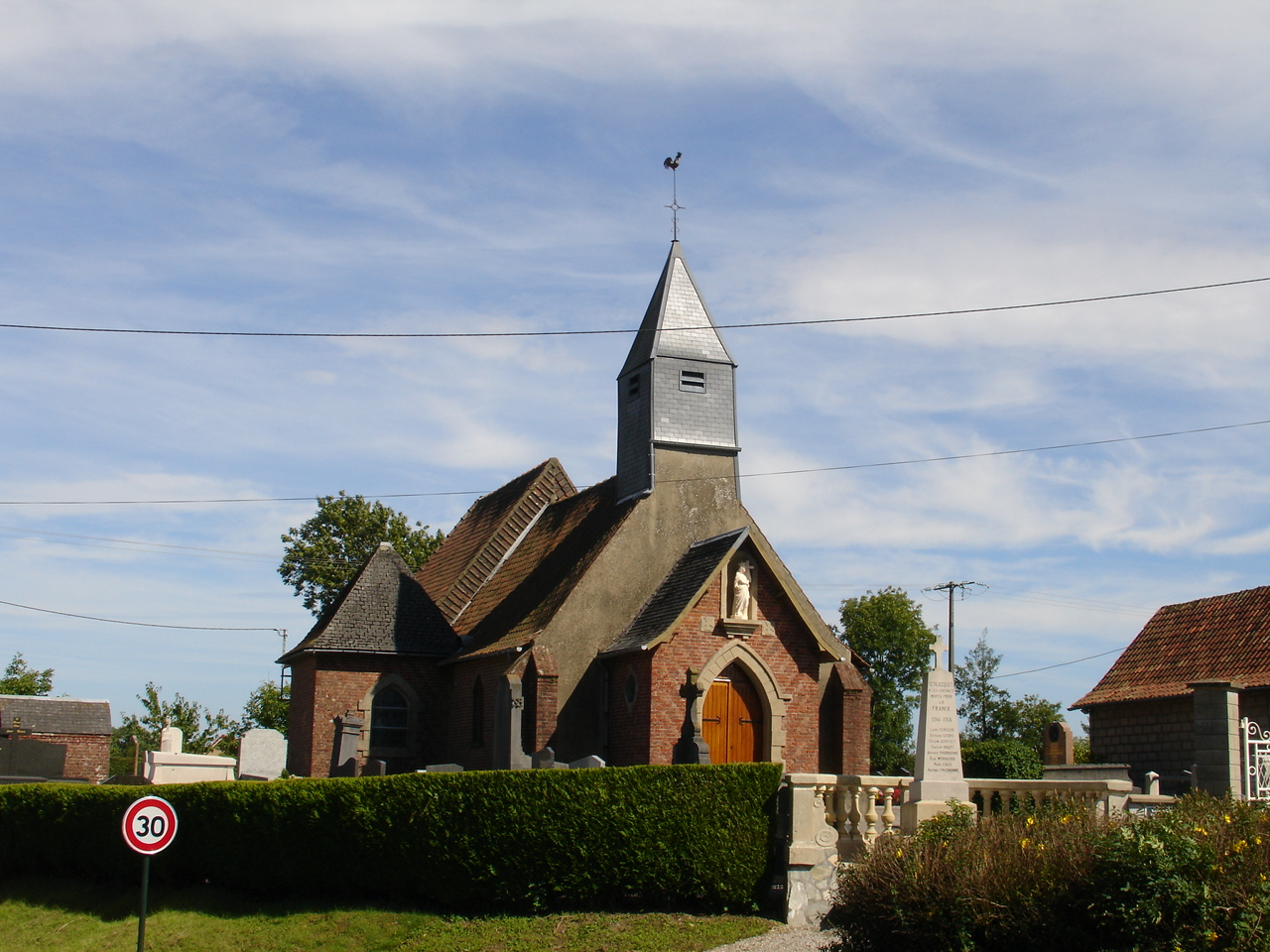 Église de Senlecques